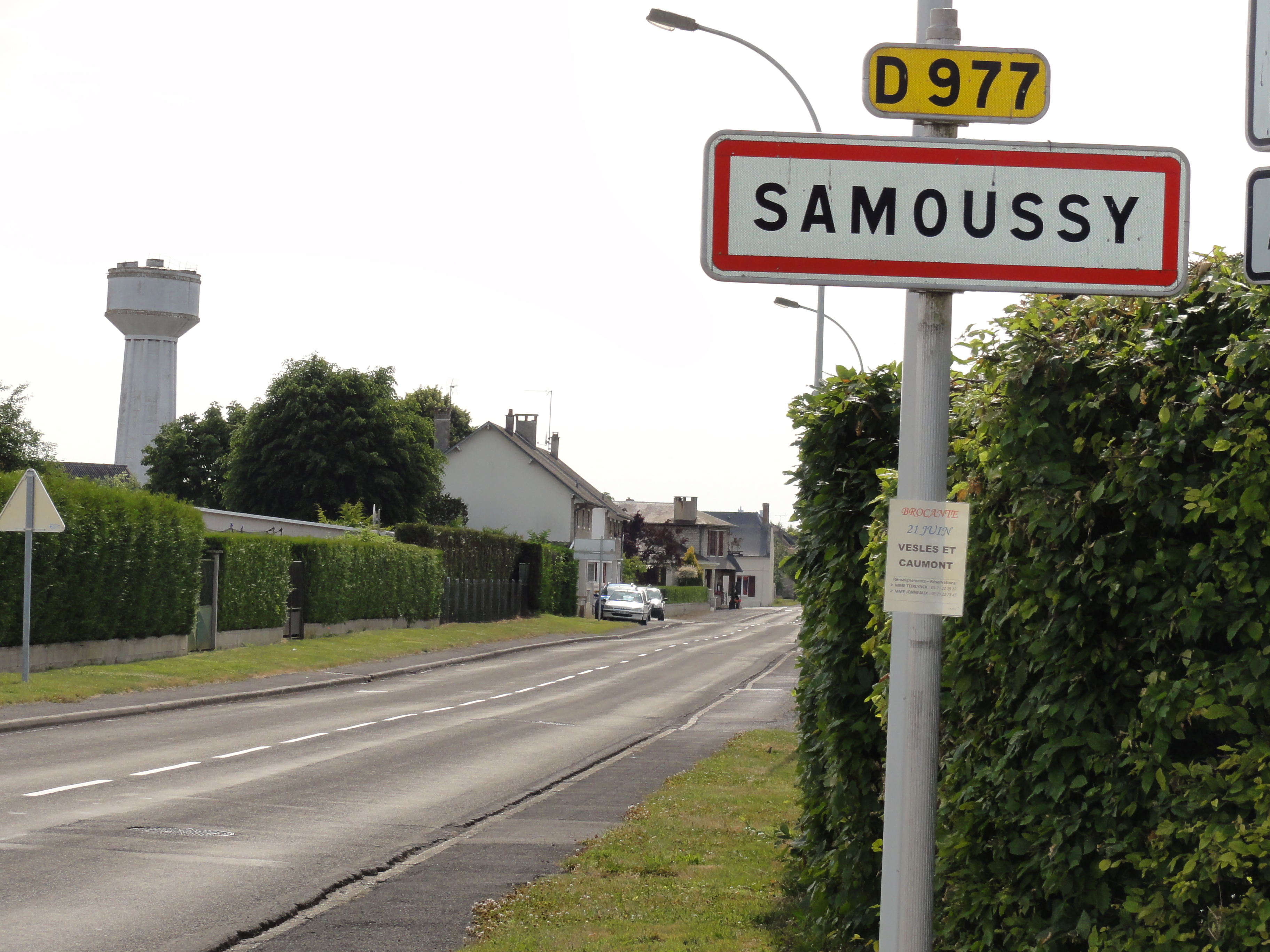 Samoussy (Aisne) city limit sign